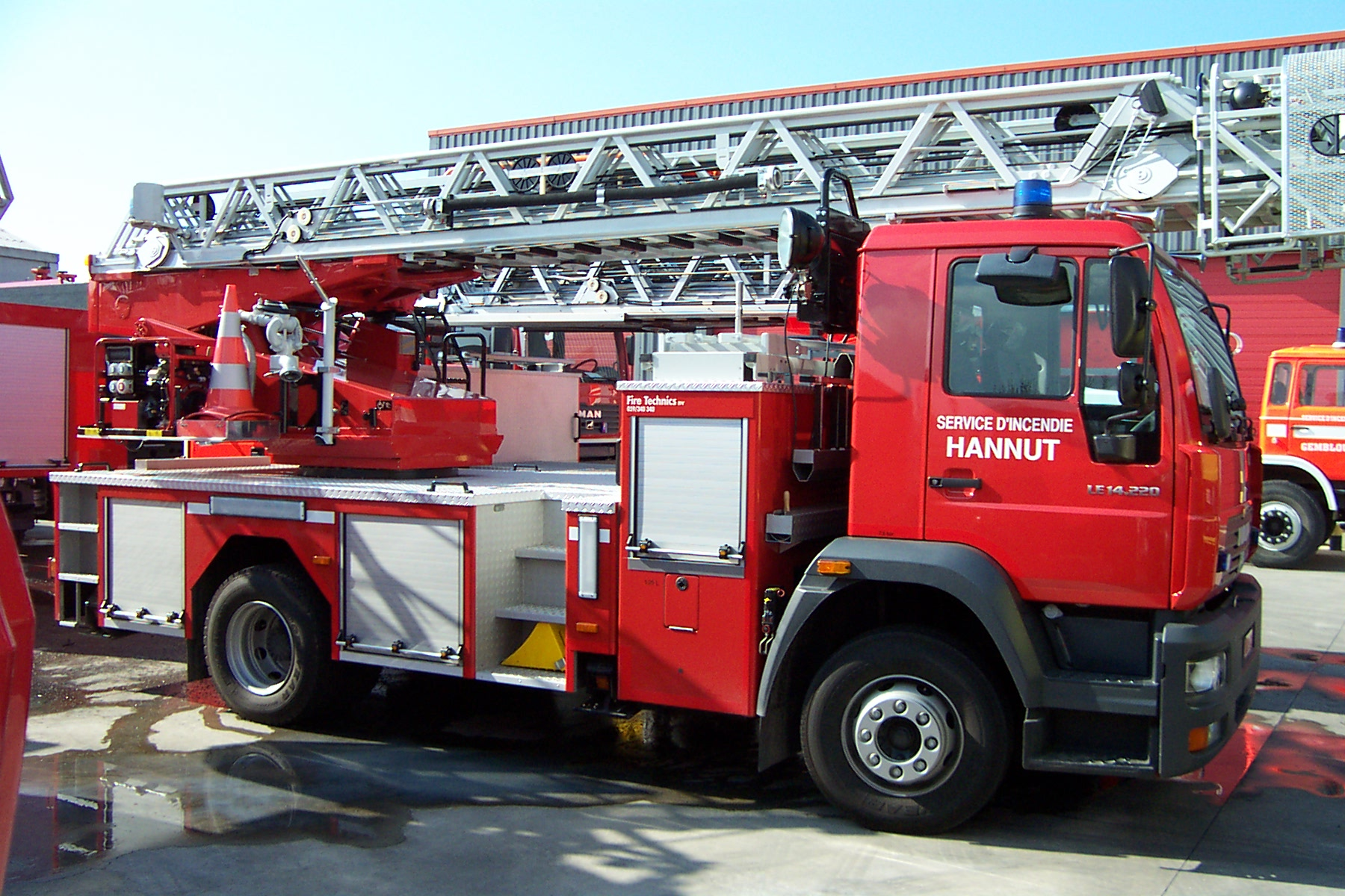 Auto-échelle des pompiers d'Hannut (Belgique) sur châssis MAN.